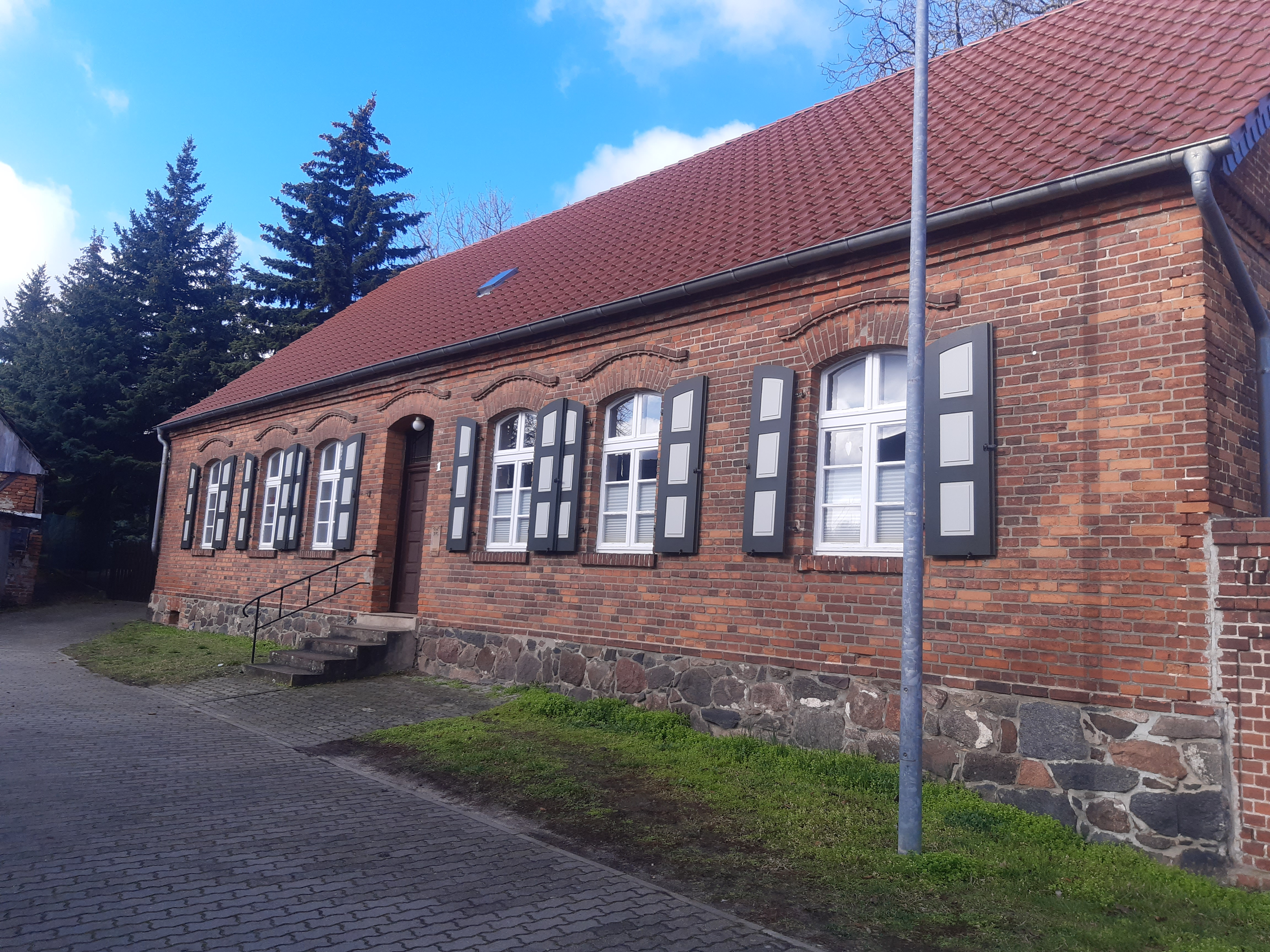 Pfarrhof